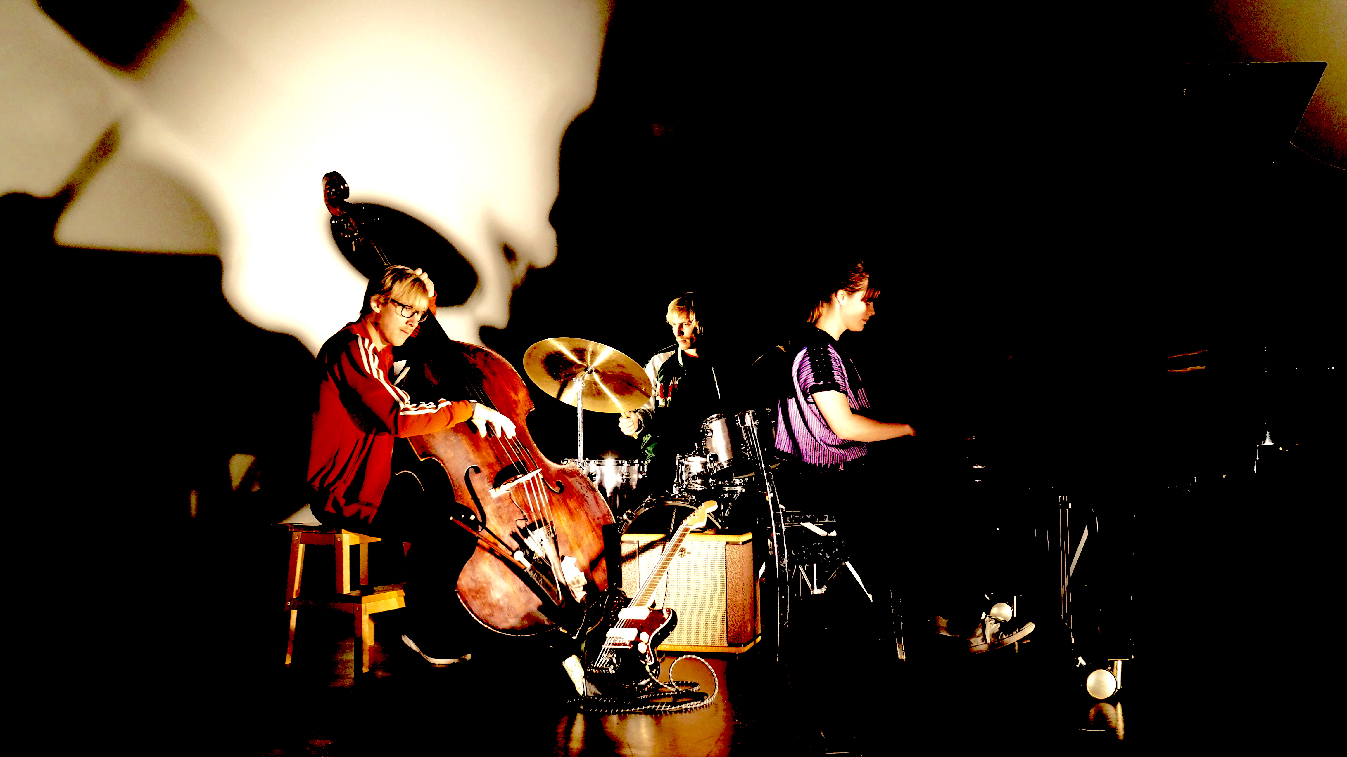 Moskus live fra Henie Onstad Kunstsenter. Foto: Christian Winther